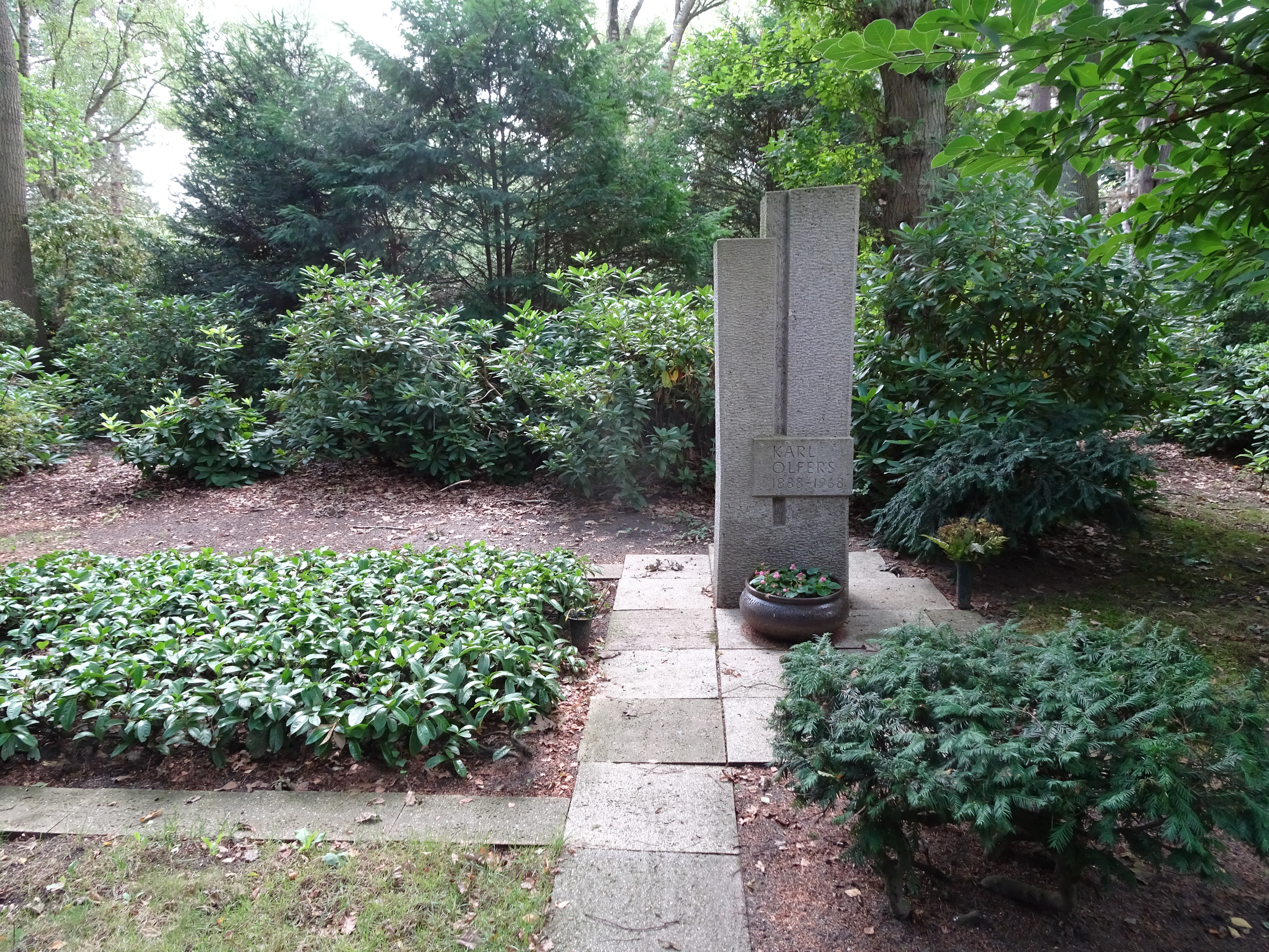 Friedhof Brockeswalde in Cuxhaven